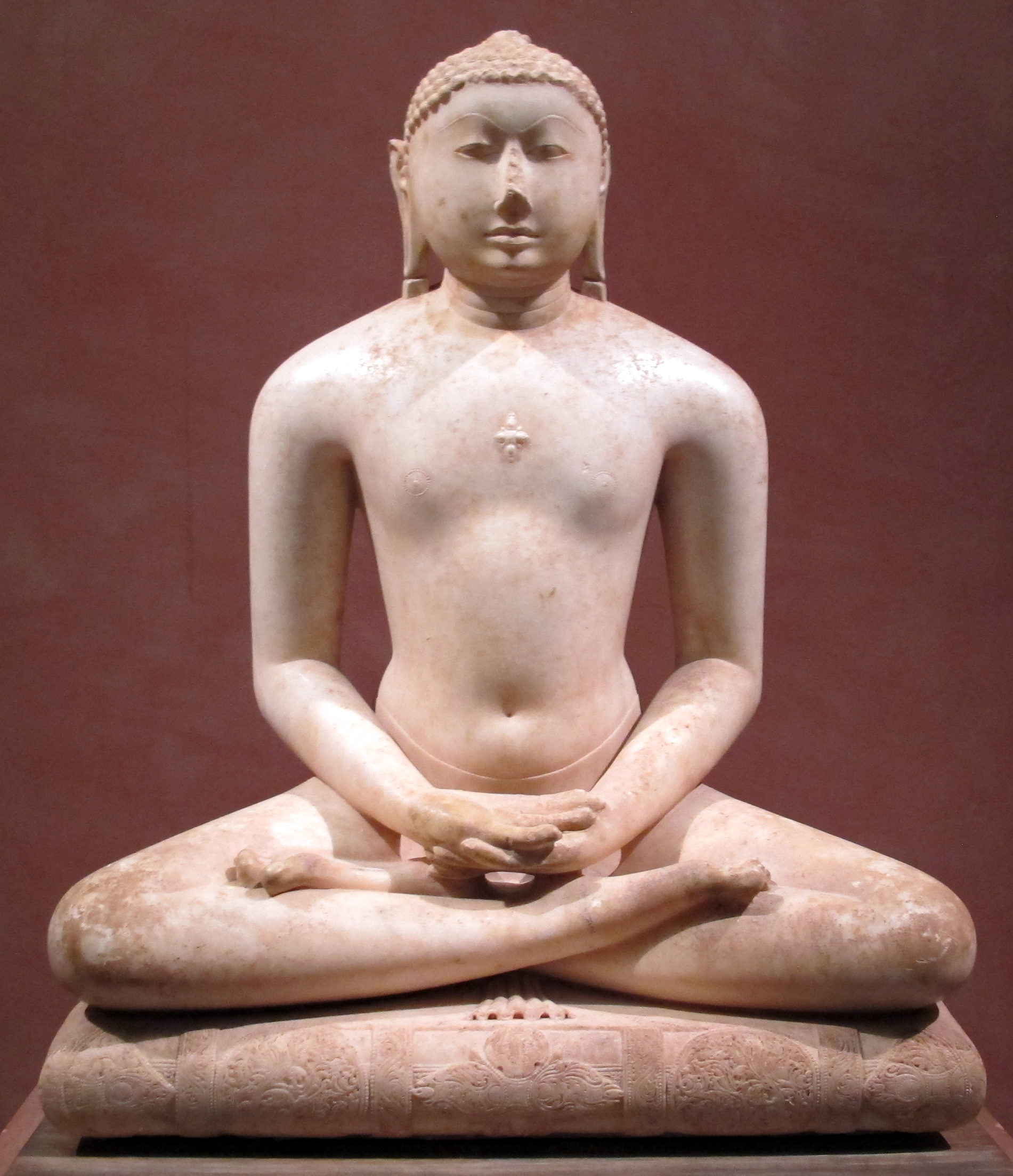 Collezione del Metropolitan Museum, NYC